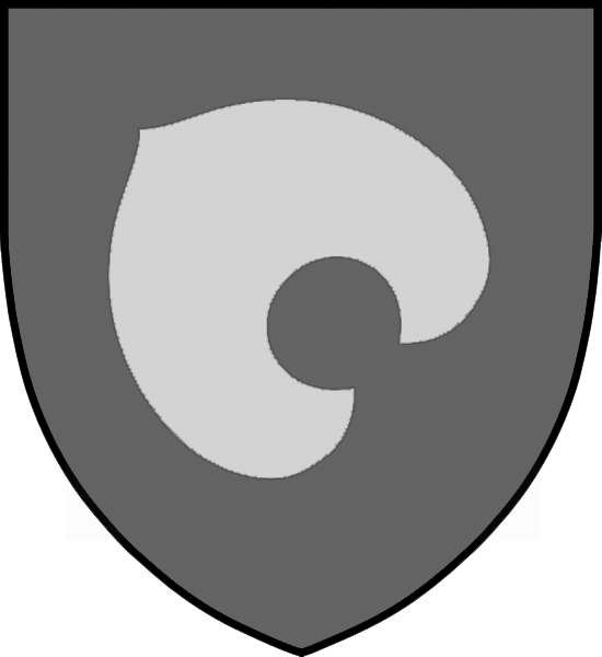 Heraldiskt sjöblad används inom de svenska sjöbladsätterna